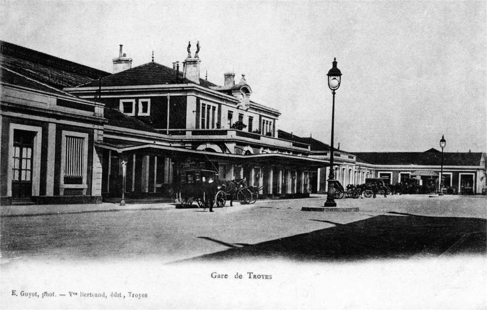 Gare de Troyes, vers 1900, le bâtiment voyageurs mis en service en 1857 par la compagnie des chemins de fer de l'Est.